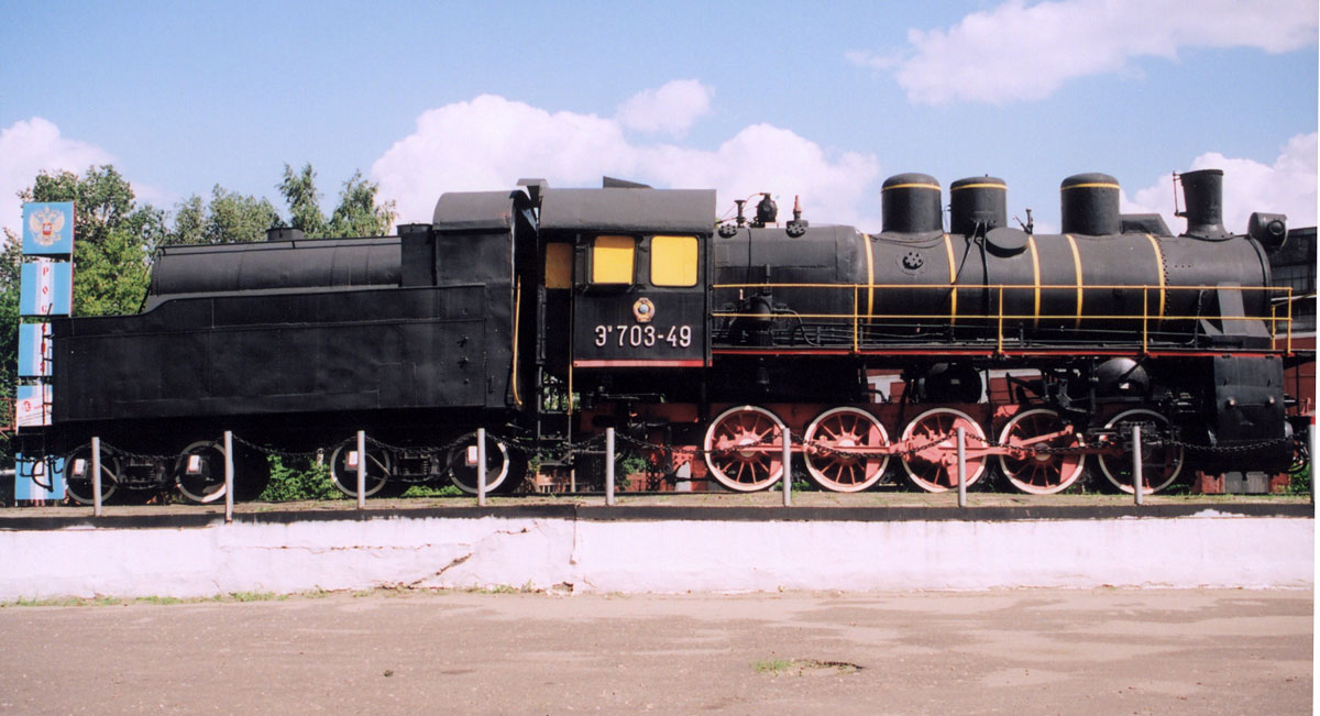 паровоз Эу 703-49 на Мичуринском ЛРЗ